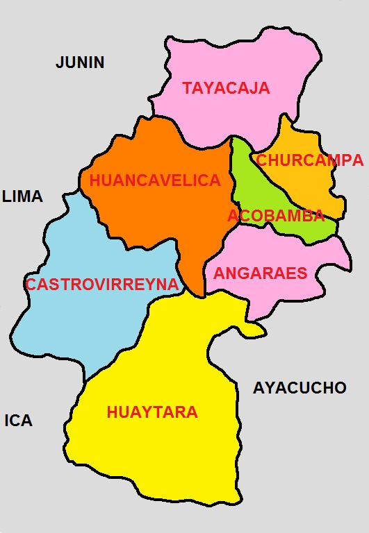 Imagen que muestra la División Politica del Departamento de Huancavelica, una de las 25 circunscripciones en que se divide el Perú